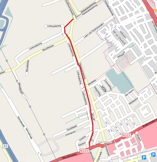 Lookwatering in de dutch village Den Hoorn